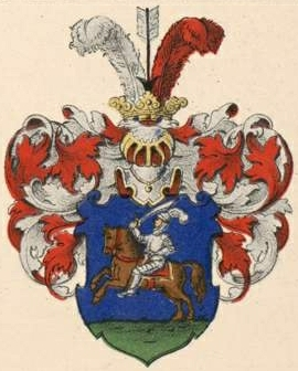 Nasackini suguvõsa aadlivapp